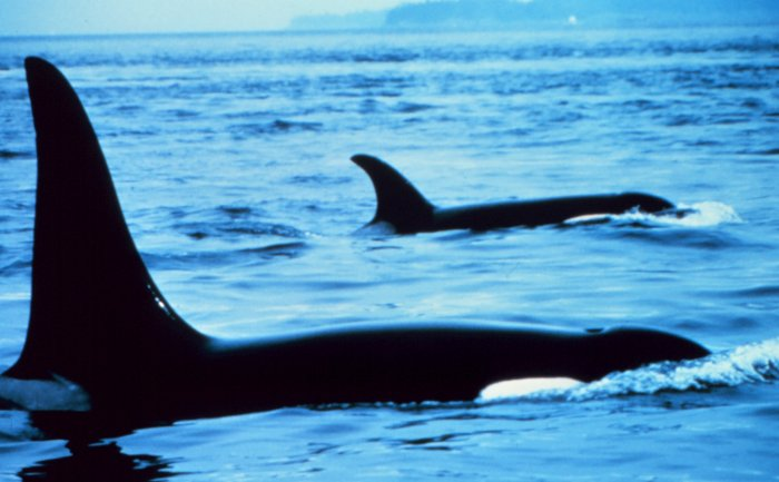 Orca wal 3